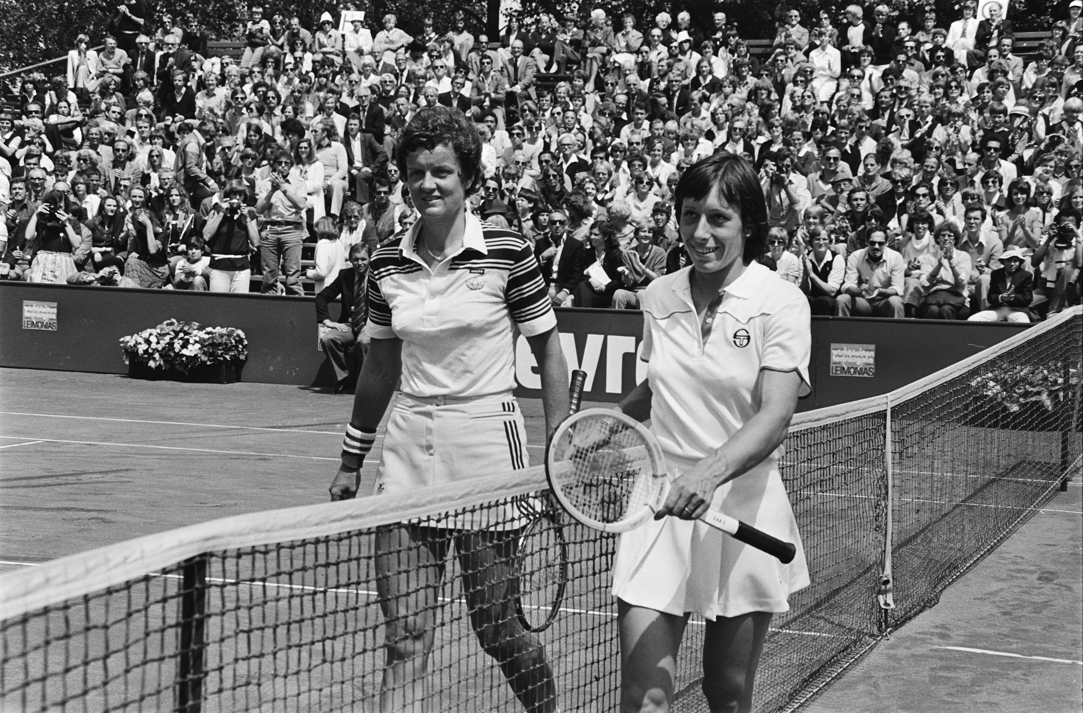 Collectie / Archief : Fotocollectie Anefo Reportage / Serie : [ onbekend ] Beschrijving : Tennis: Nederland tegen Verenigde Staten in Den Haag ; Betty Stöve (links) en Martina Navrátilová na afloop van hun partij Datum : 6 juli 1980 Locatie : Den Haag, Zuid-Holland Trefwoorden : tennis Persoonsnaam : Betty Stove Fotograaf : Dijk, Hans van / Anefo Auteursrechthebbende : Nationaal Archief Materiaalsoort : Negatief (zwart/wit) Nummer archiefinventaris : bekijk toegang 2.24.01.05 Bestanddeelnummer : 930-9117